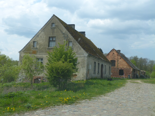 Hofanlage Krühne.